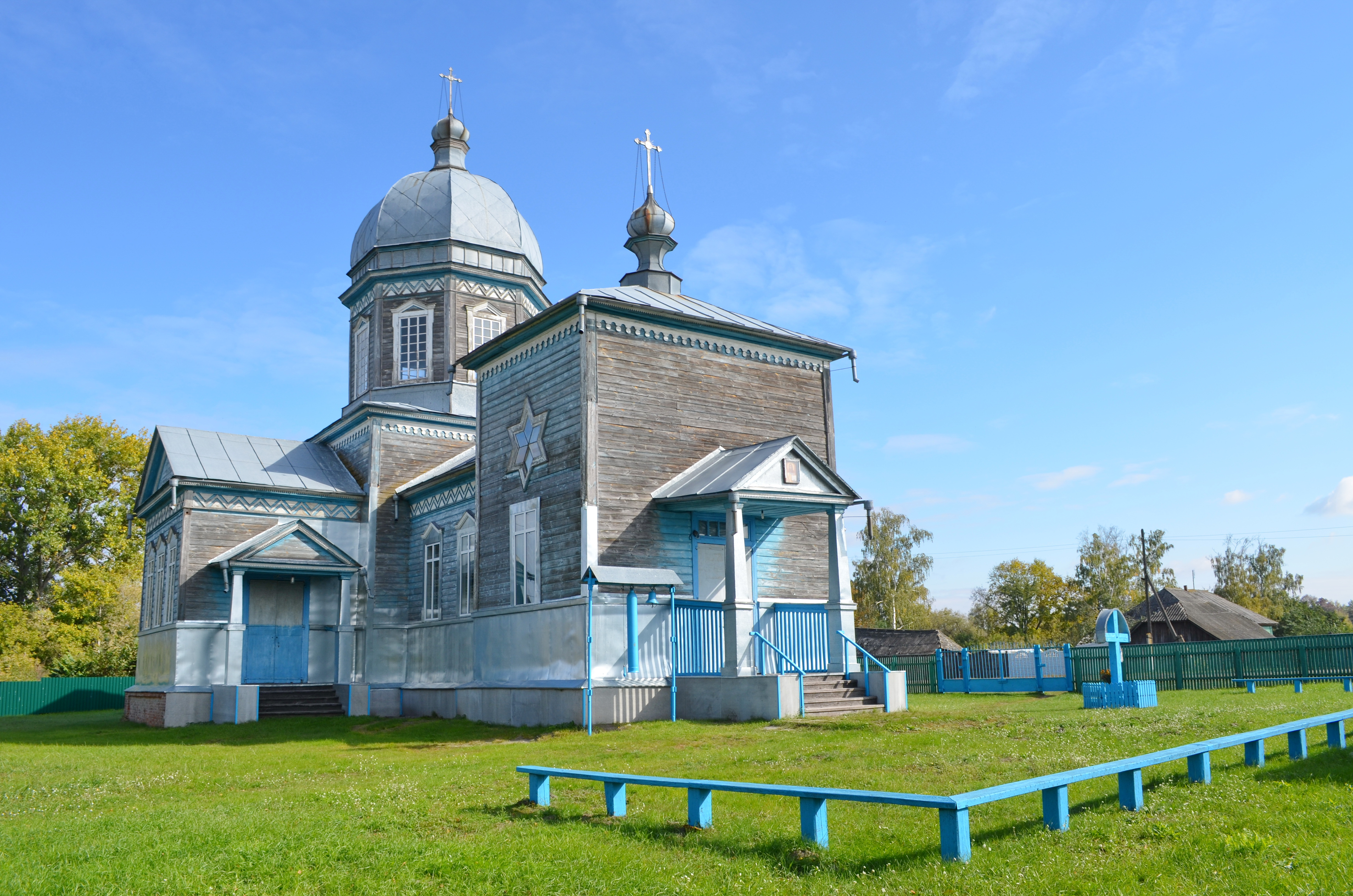 Миколаївська церква (дер.), село Гути, вул. Радянська, 37